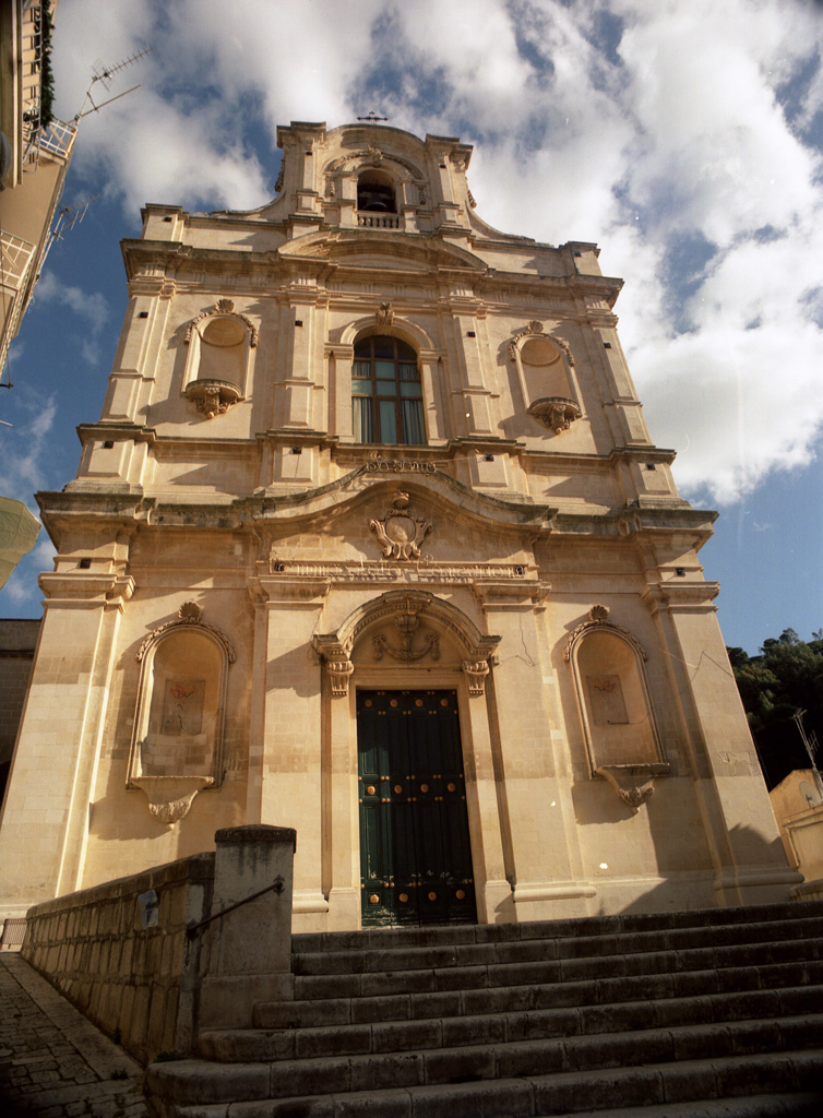 Chiesa di Santa Maria La Nova (solo esterni) This is a photo of a monument which is part of cultural heritage of Italy.